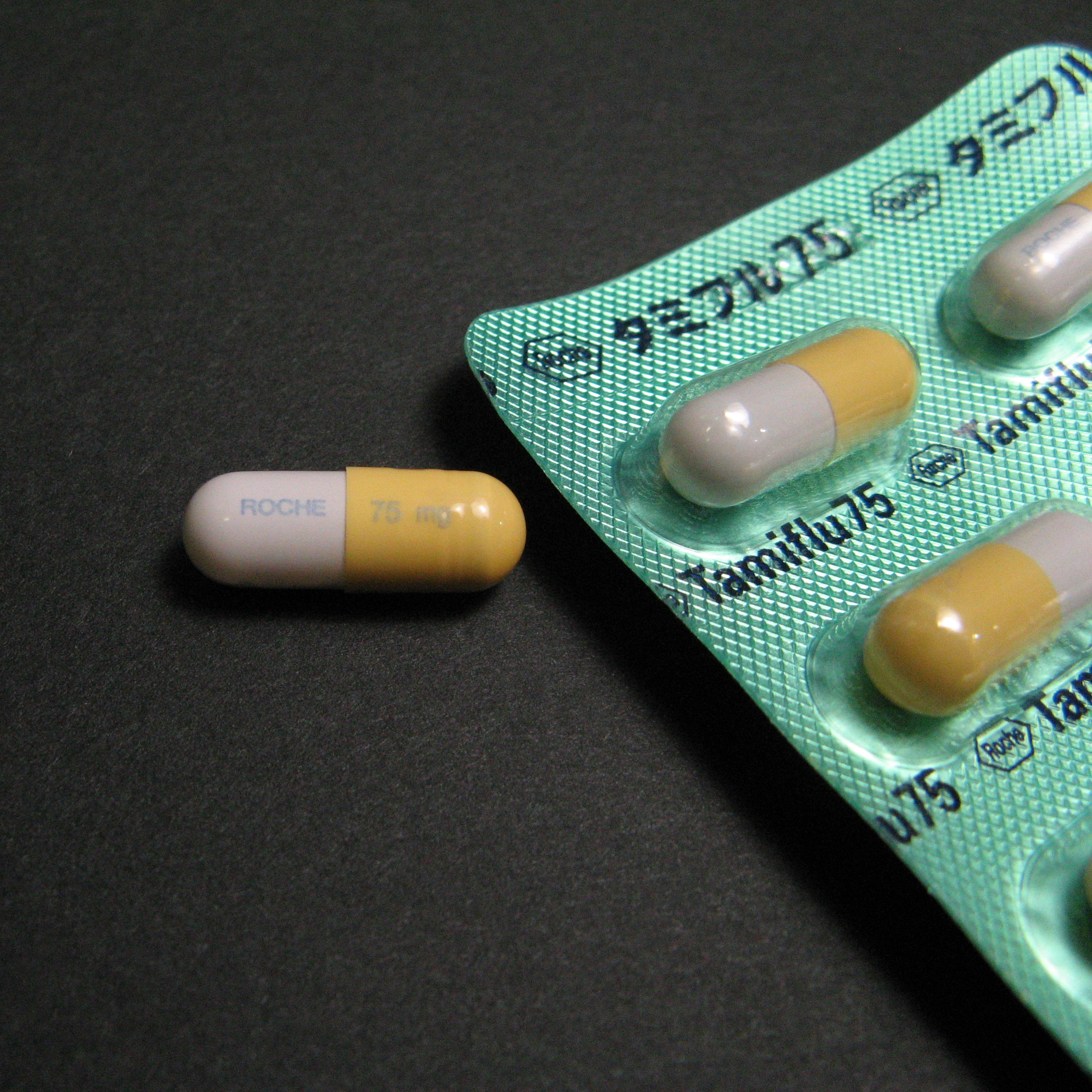 Oseltamivir (Japan)